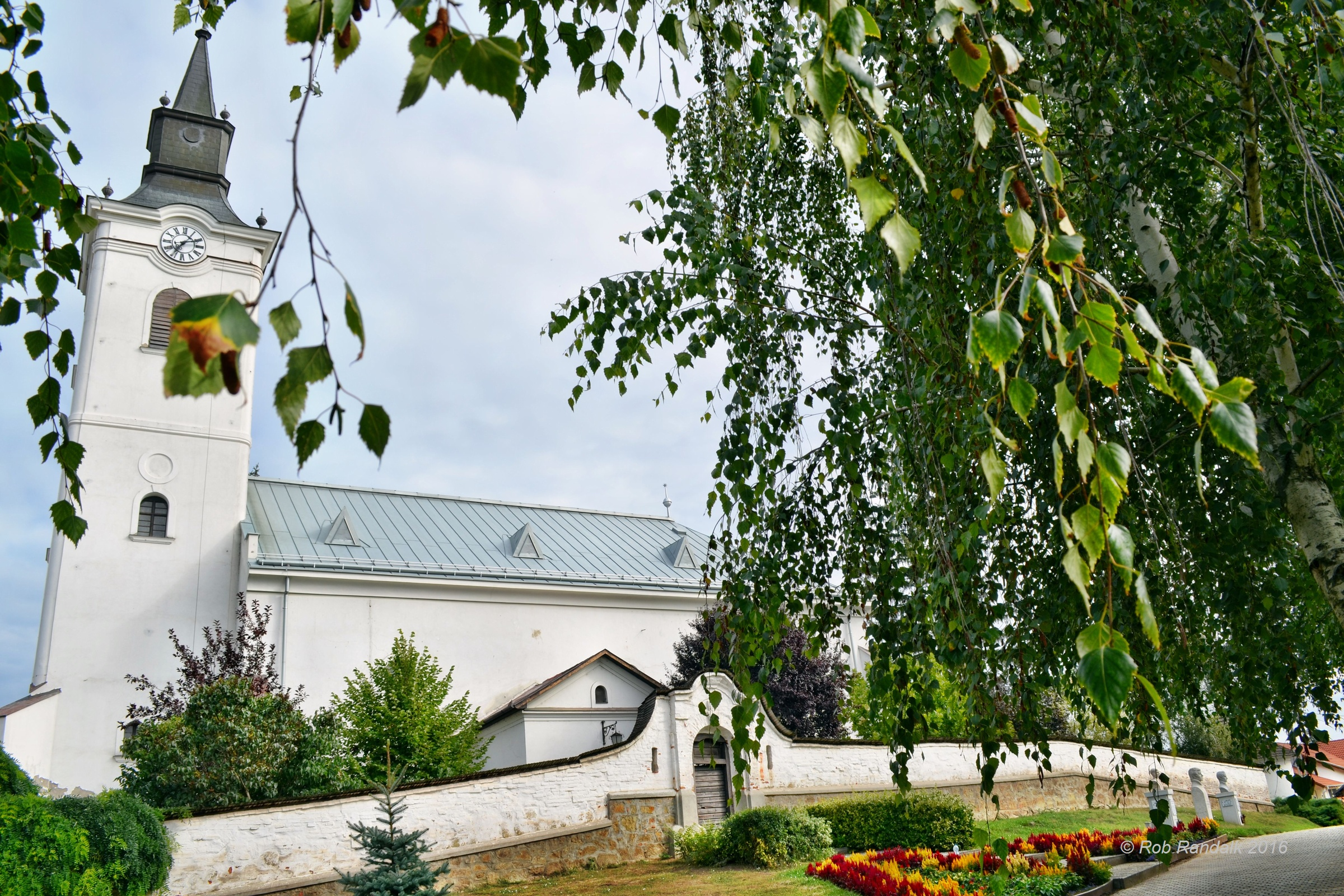 Tiszavaswari Tiszavaswari